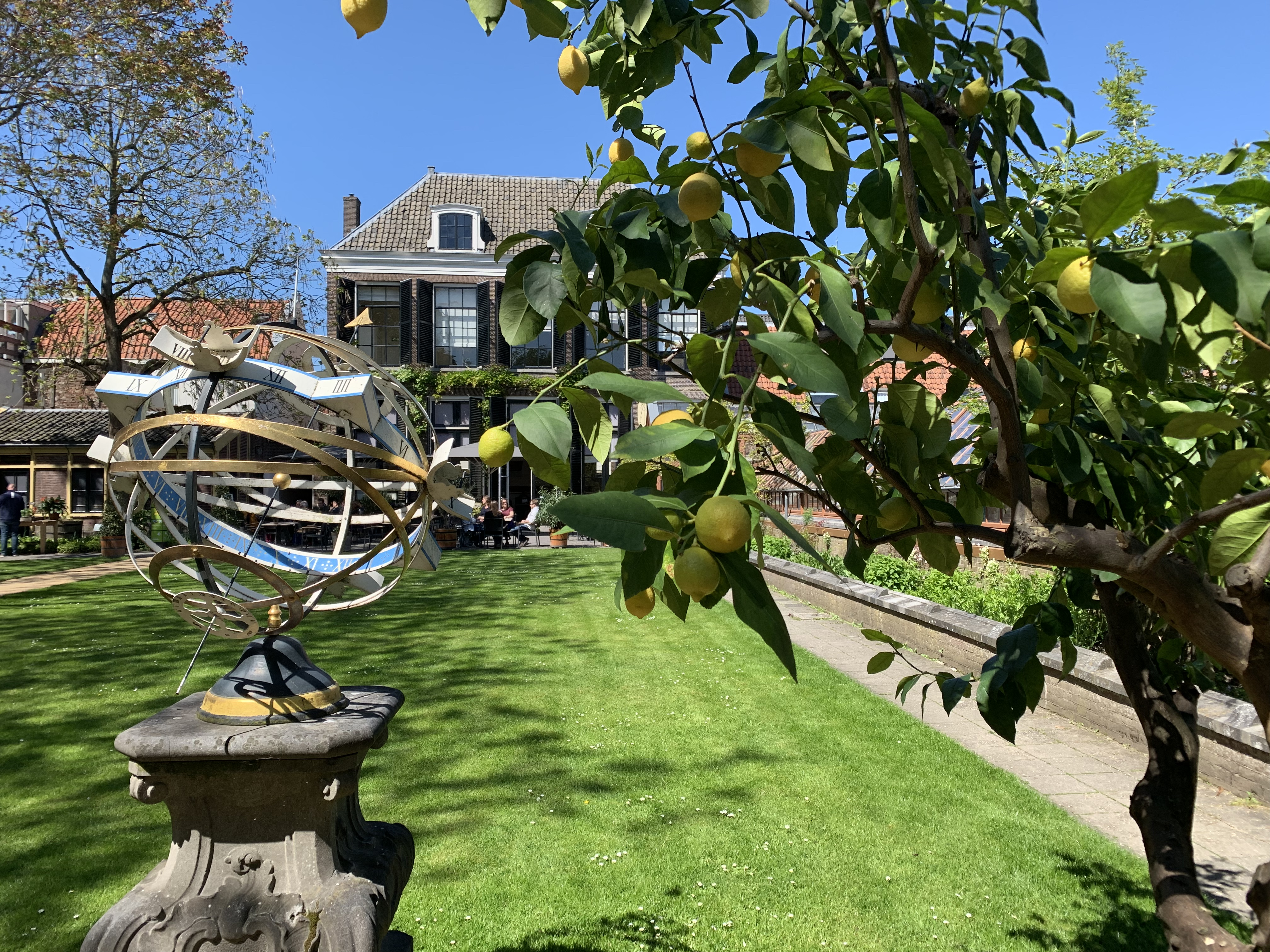 Citroenboom en zonnewijzer in Botanische tuin. Plant gefotografeerd in de Botanische tuin bij het Universiteitsmuseum in Utrecht, Nederland